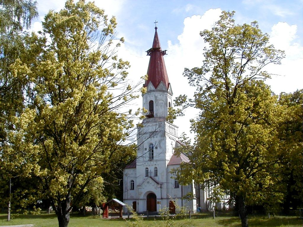 Rucavas baznīca 2000-07-09